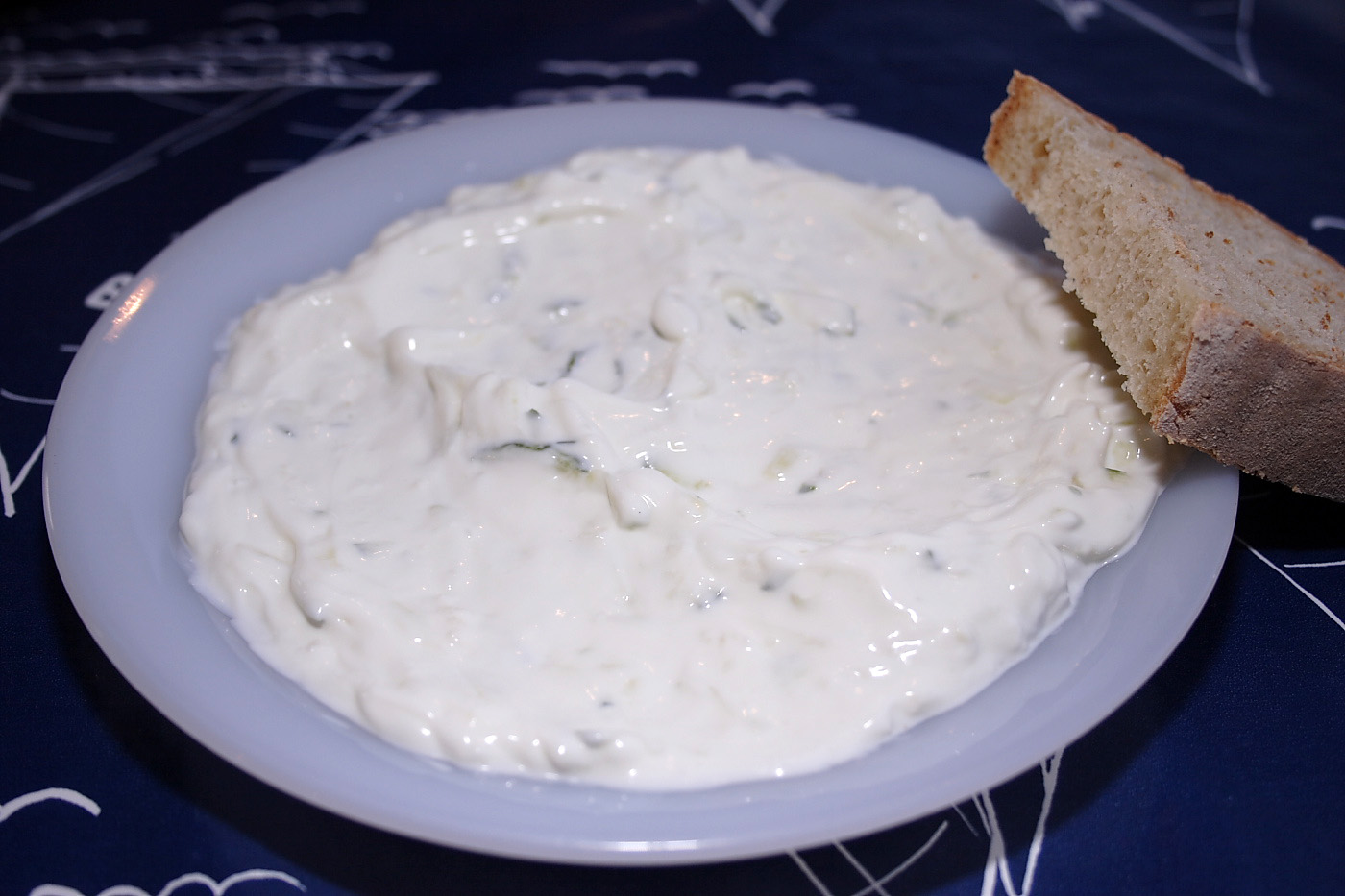 Tzatziki